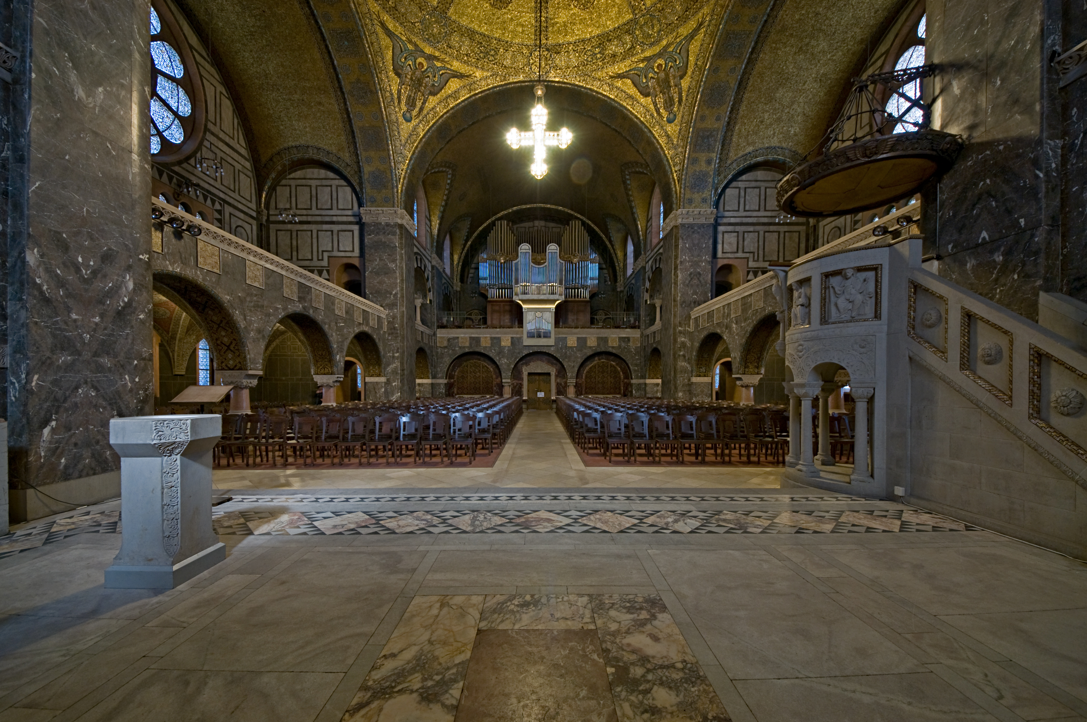 Erlöserkirche Bad Homburg: Innenraum, Hauptachse, Blick vom Altar